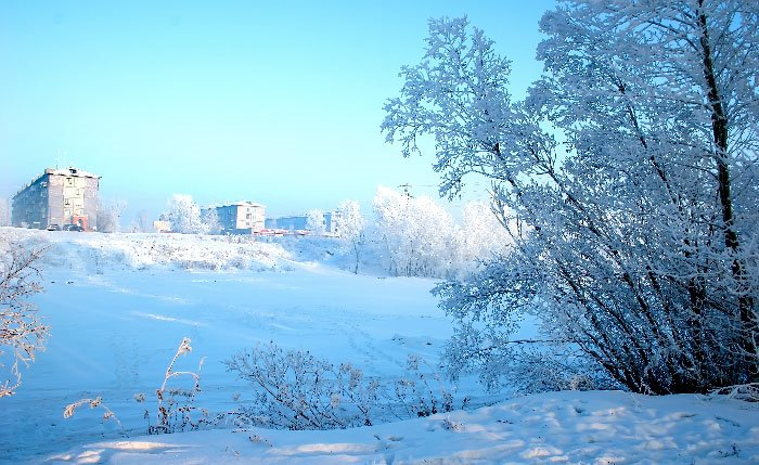 Канск. Зима